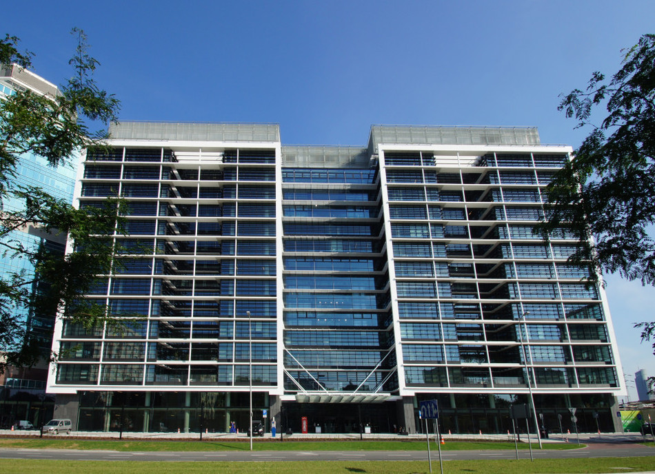 Siedziba firmy Qumak – Biurowiec Eurocentrum, Warszawa